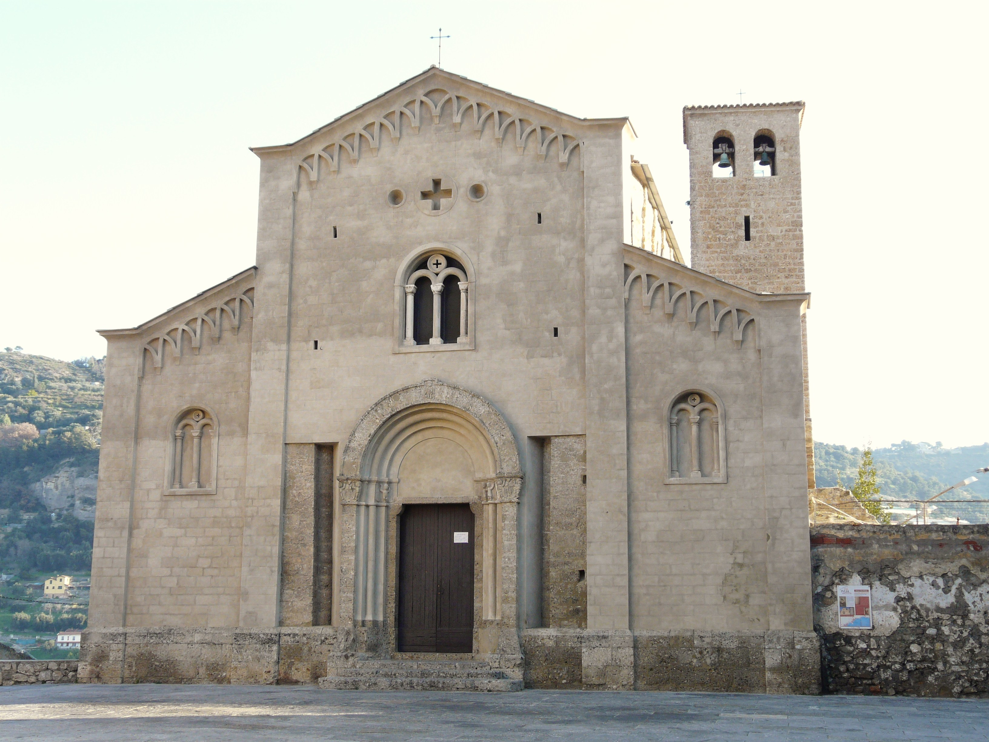 Chiesa di San Michele, Ventimiglia Alta, Liguria, Italia